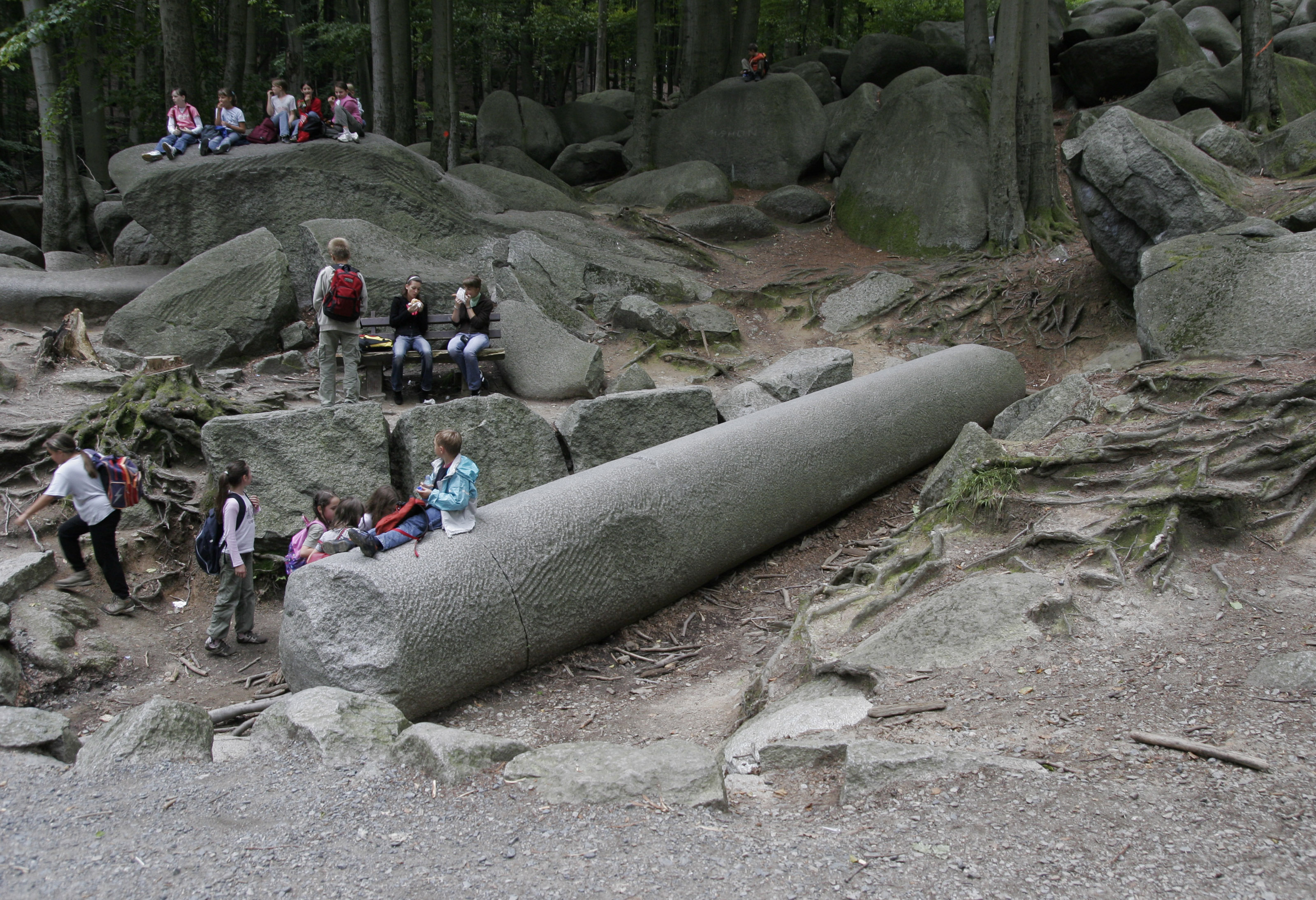 Die Riesensäule im Felsenmeer bei Lautertal (Odenwald) Ortsteil Reichenbach